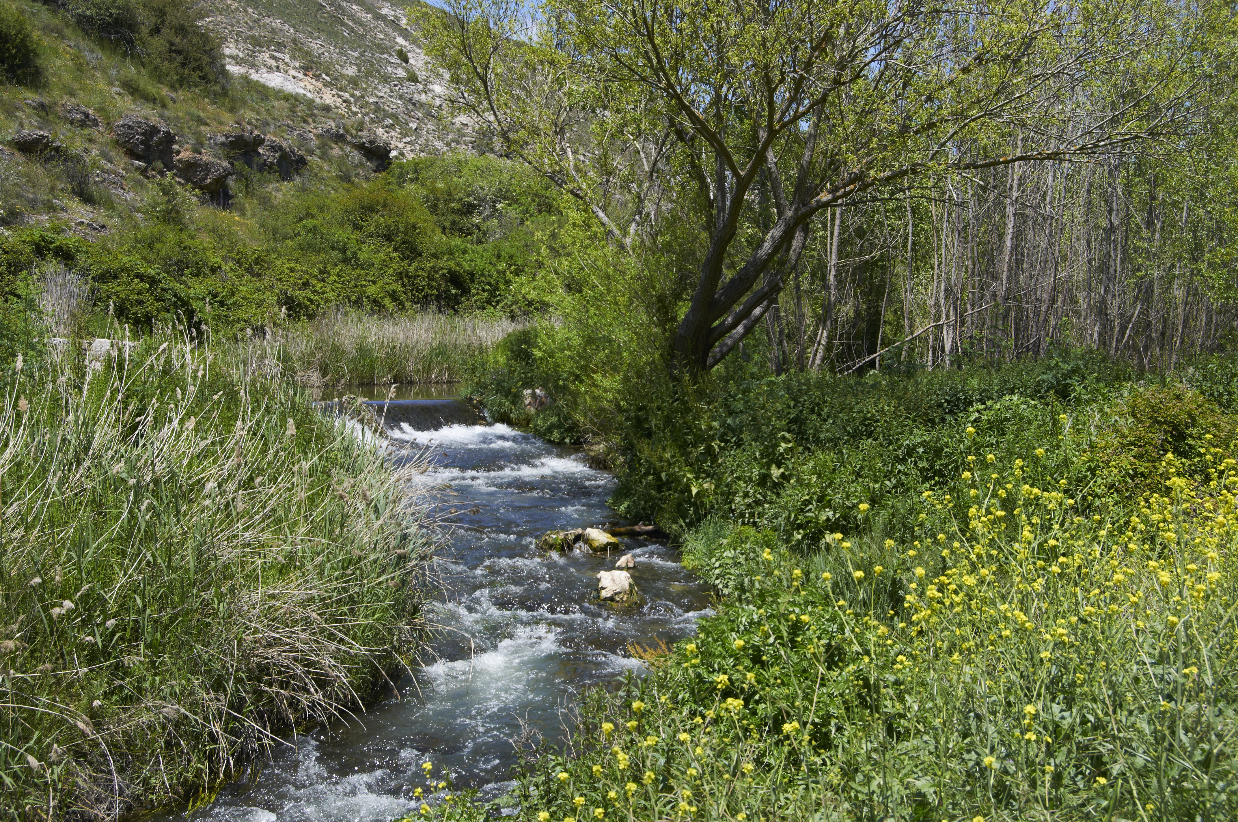 Henares